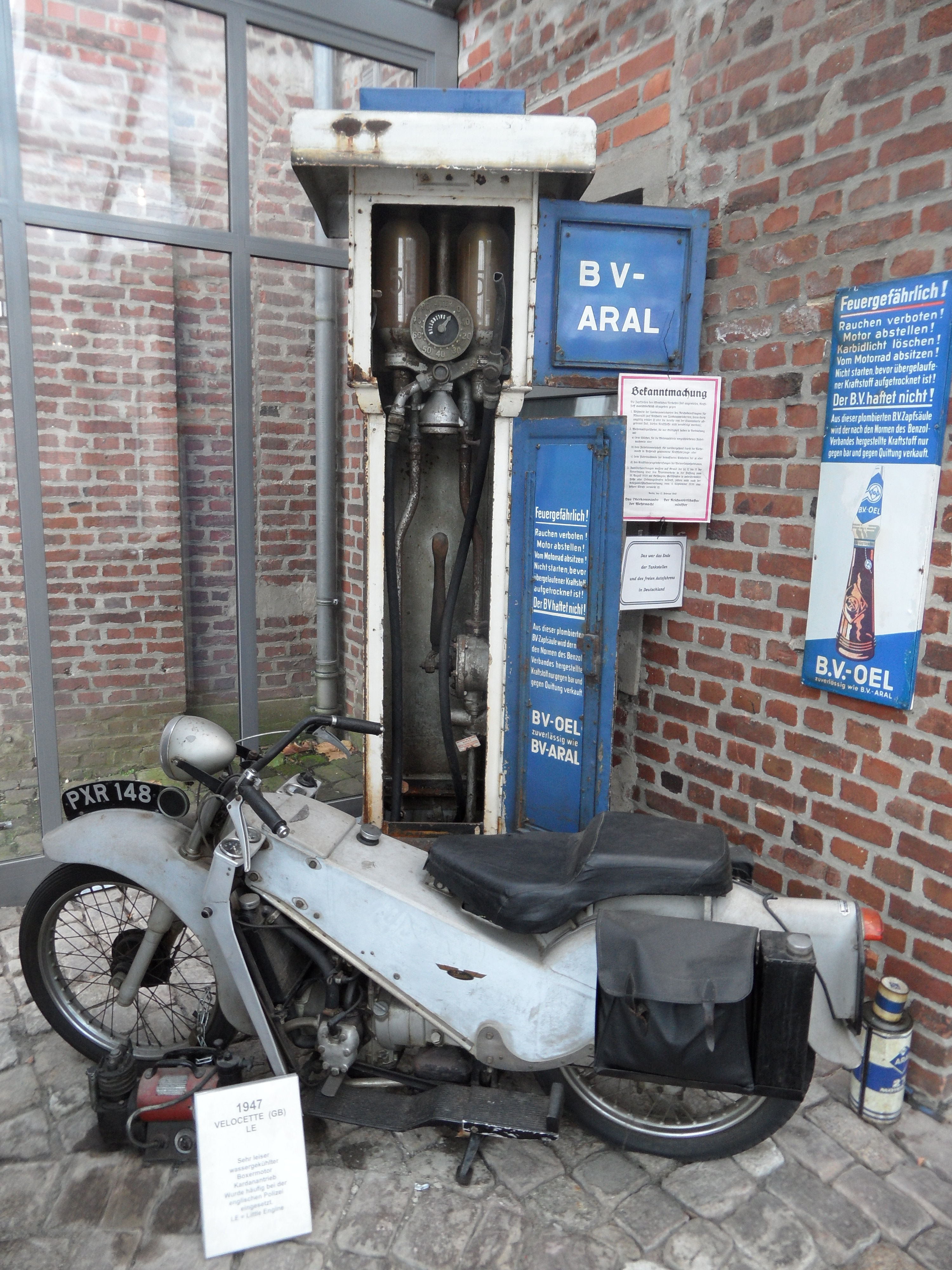 Zabytkowy motocykl znajduje się w muzeum w Melle